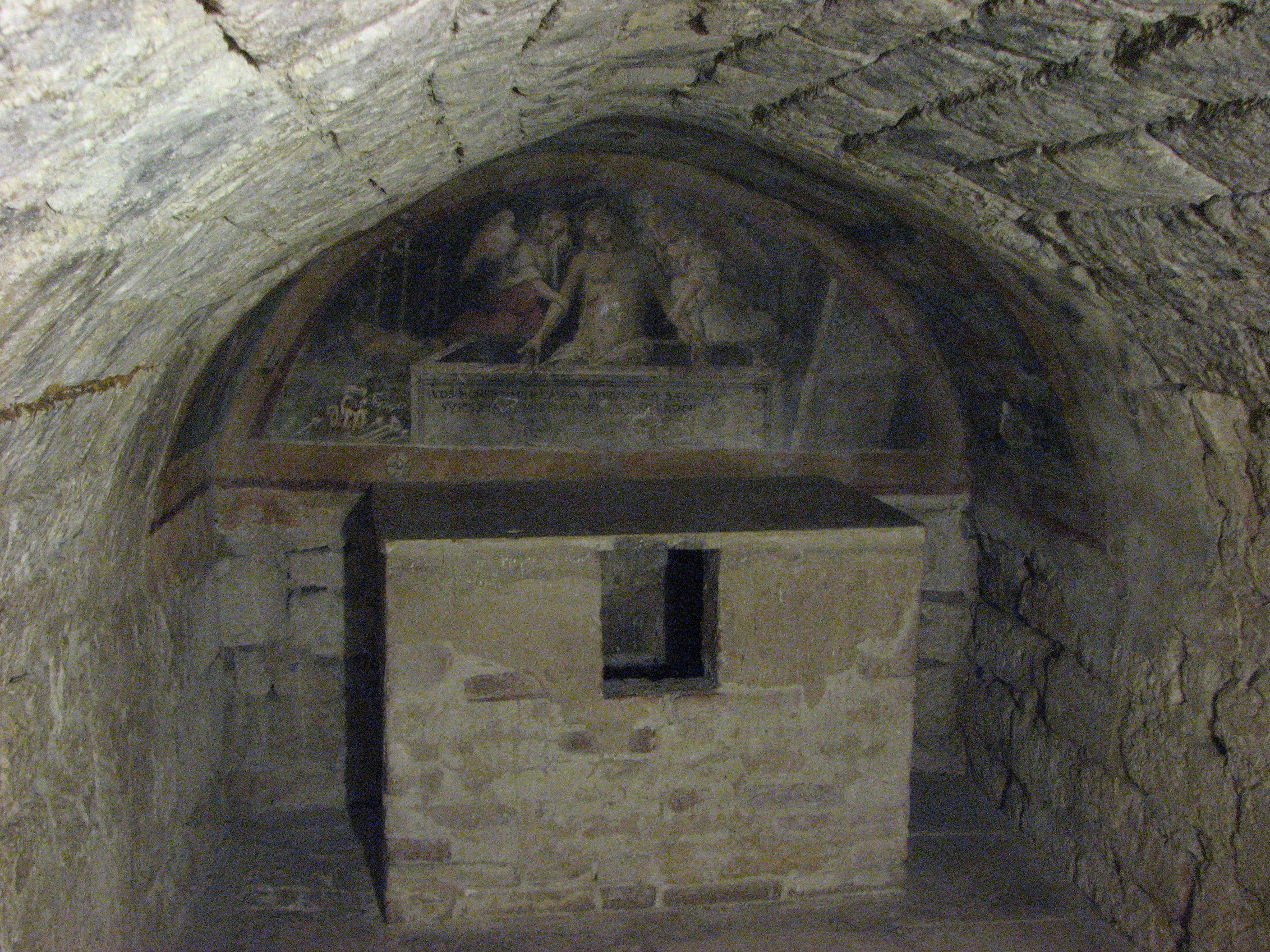 L'Abbazia di Sant'Antimo (Montalcino, Toscana, Italy) - La cripta